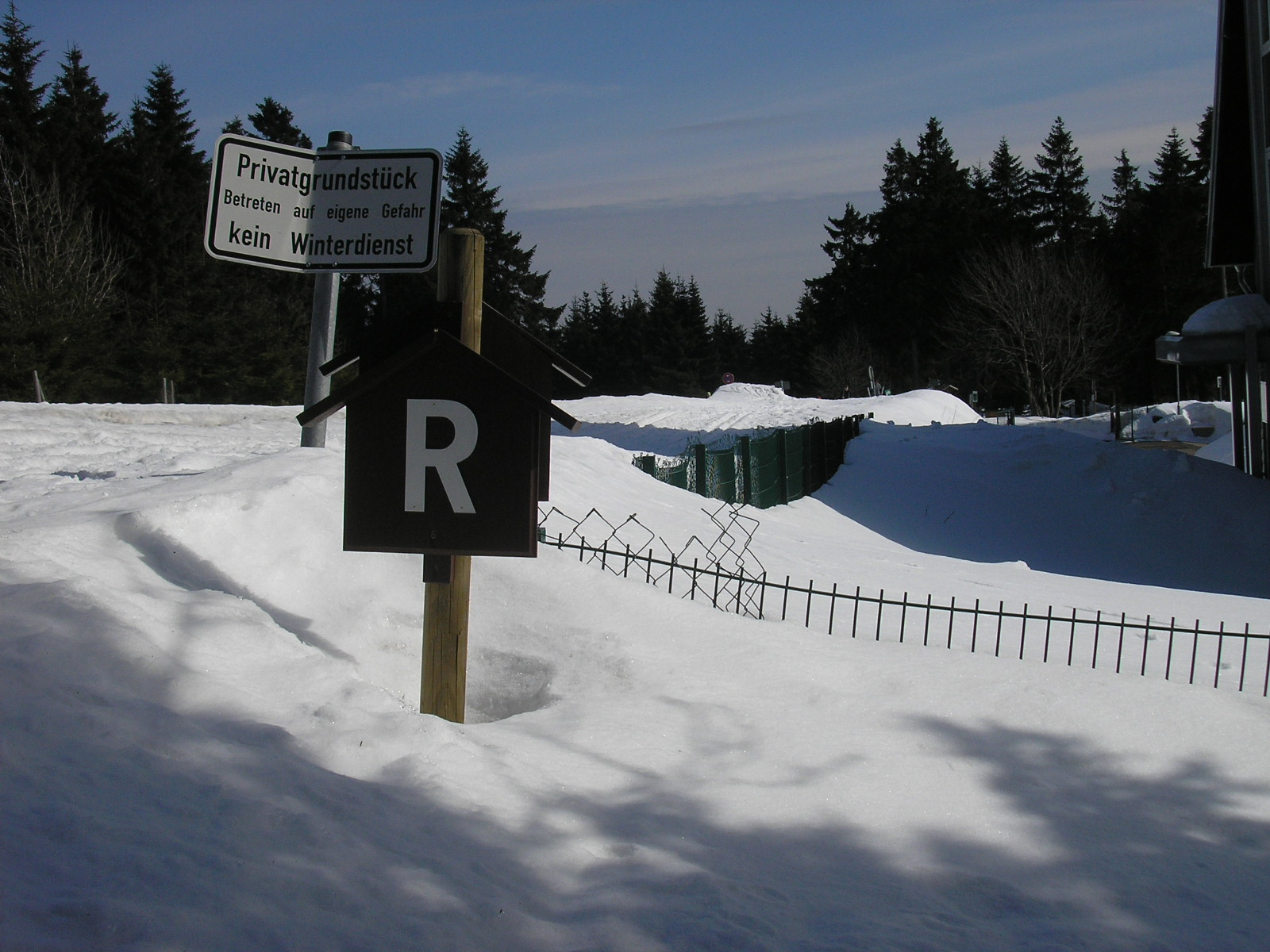 Winter am Rennsteig, rechts die Wetterstation Schmücke mit ihrem gut zwei Meter hohen Gitterzaun.